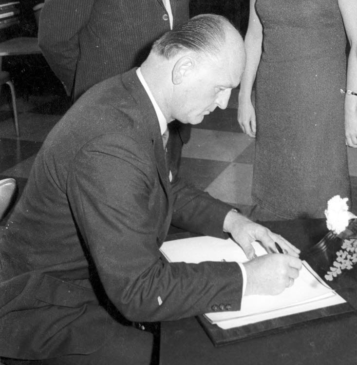 Sozialminister Otto Eisenmann trägt sich ein. Stehend MdL Hans Joachim Herbst (FDP) und die Leiterin des Hauses, Felicitas Clark.